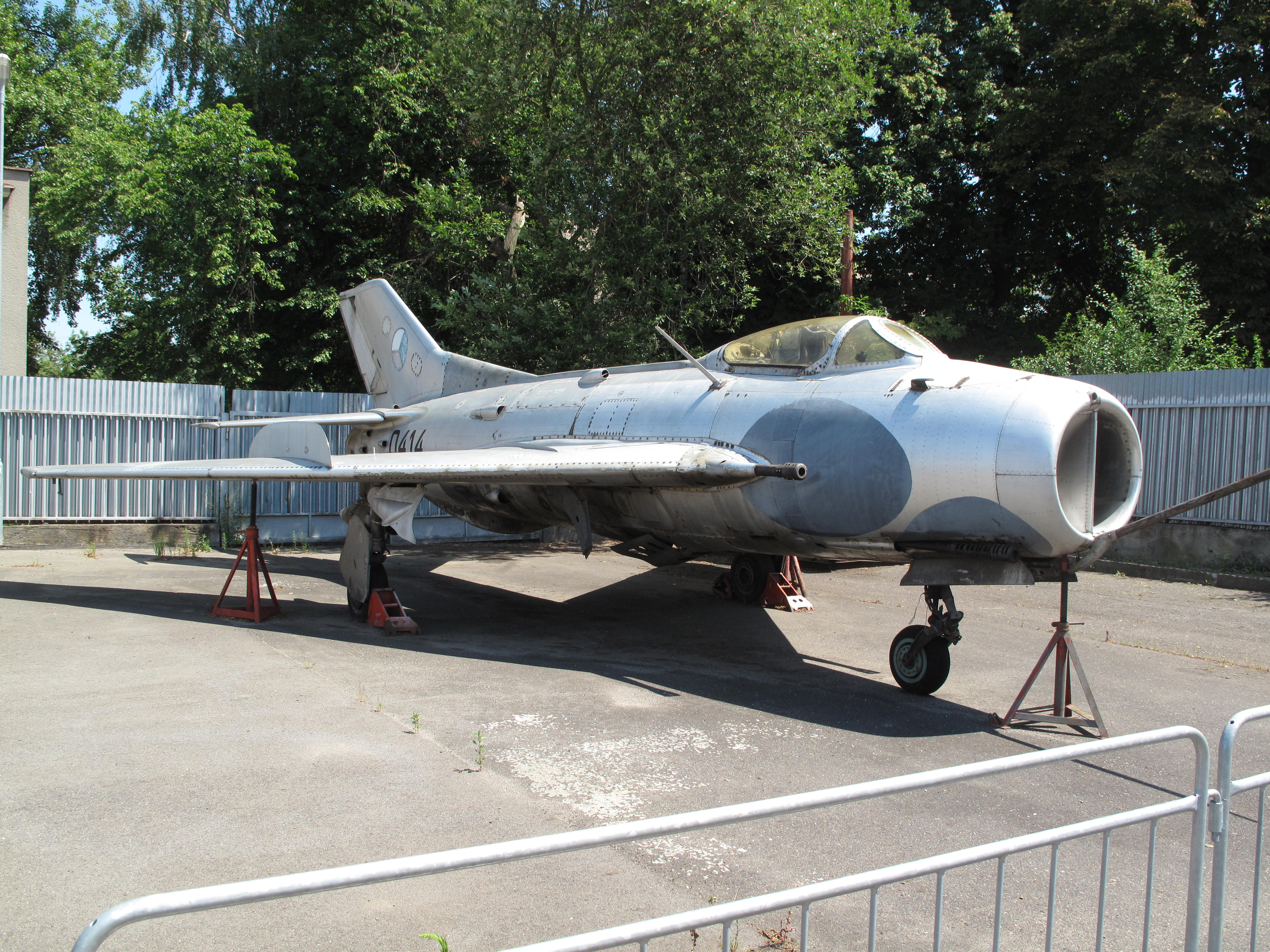 Aero S.105 (MiG-19S) ; Letecké muzeum Kbely